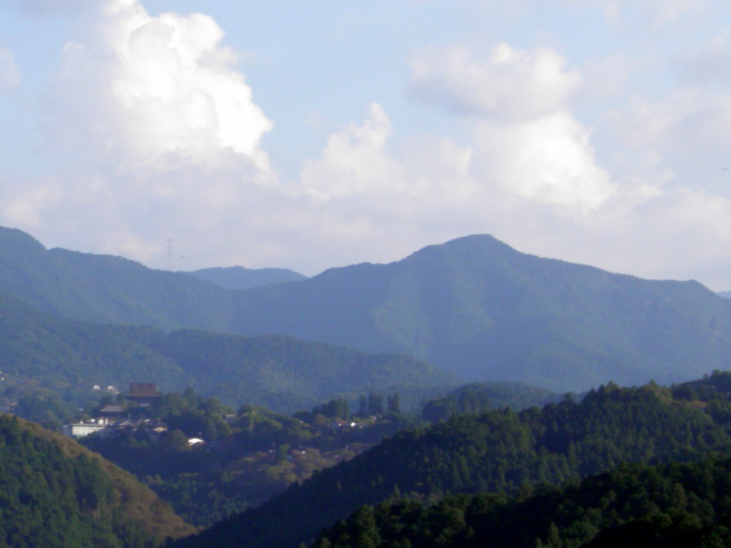 奈良県吉野郡吉野町、大和上市駅にある大和仏舎利塔より百貝岳（黒滝村）を見る